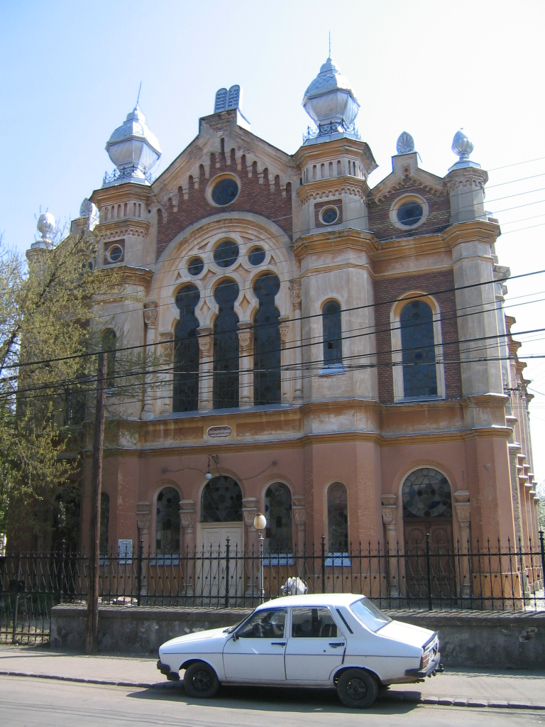 Synagogue, Oradea, Romania